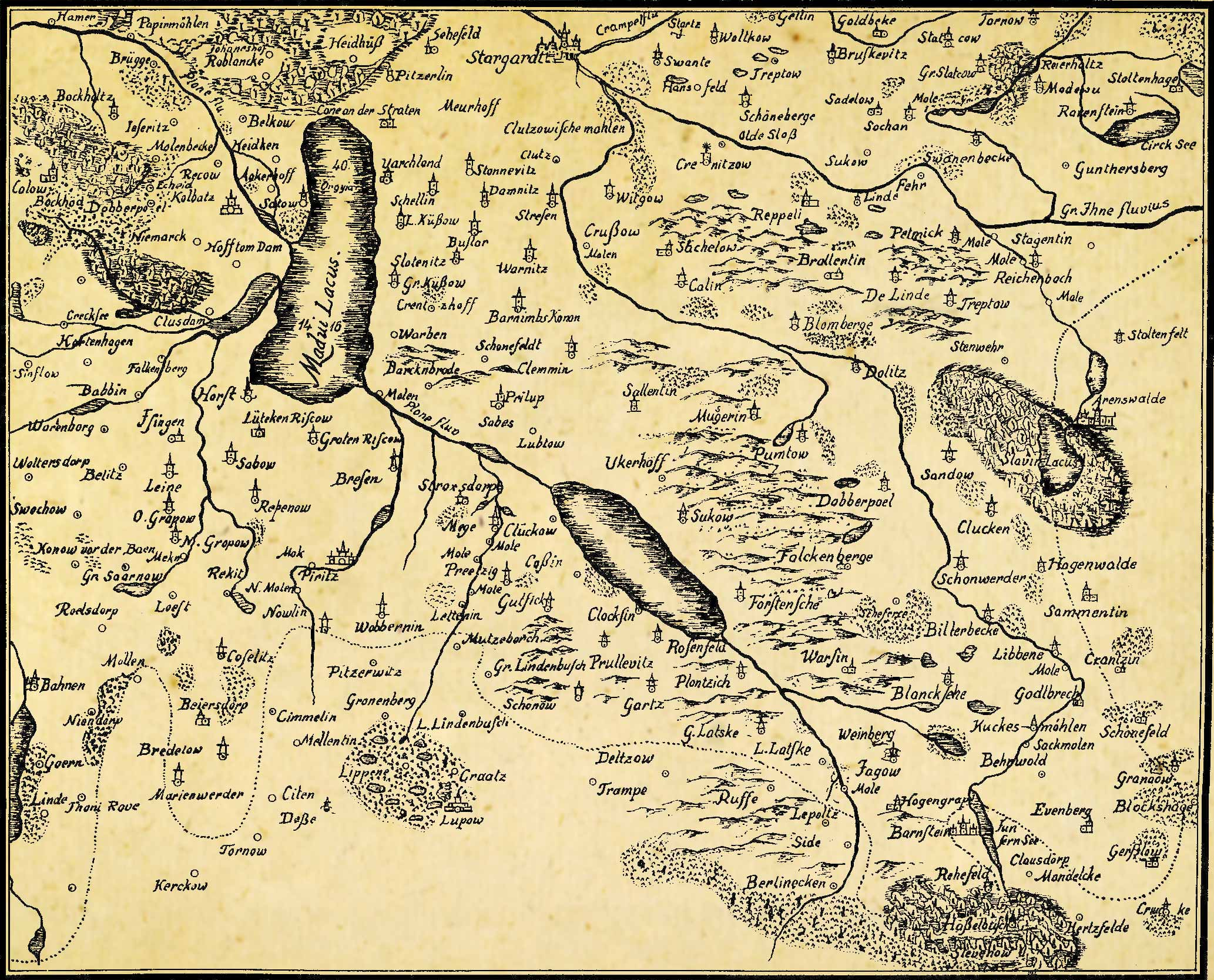 Die Lubinische Karte Darstellung von Pommern 1612